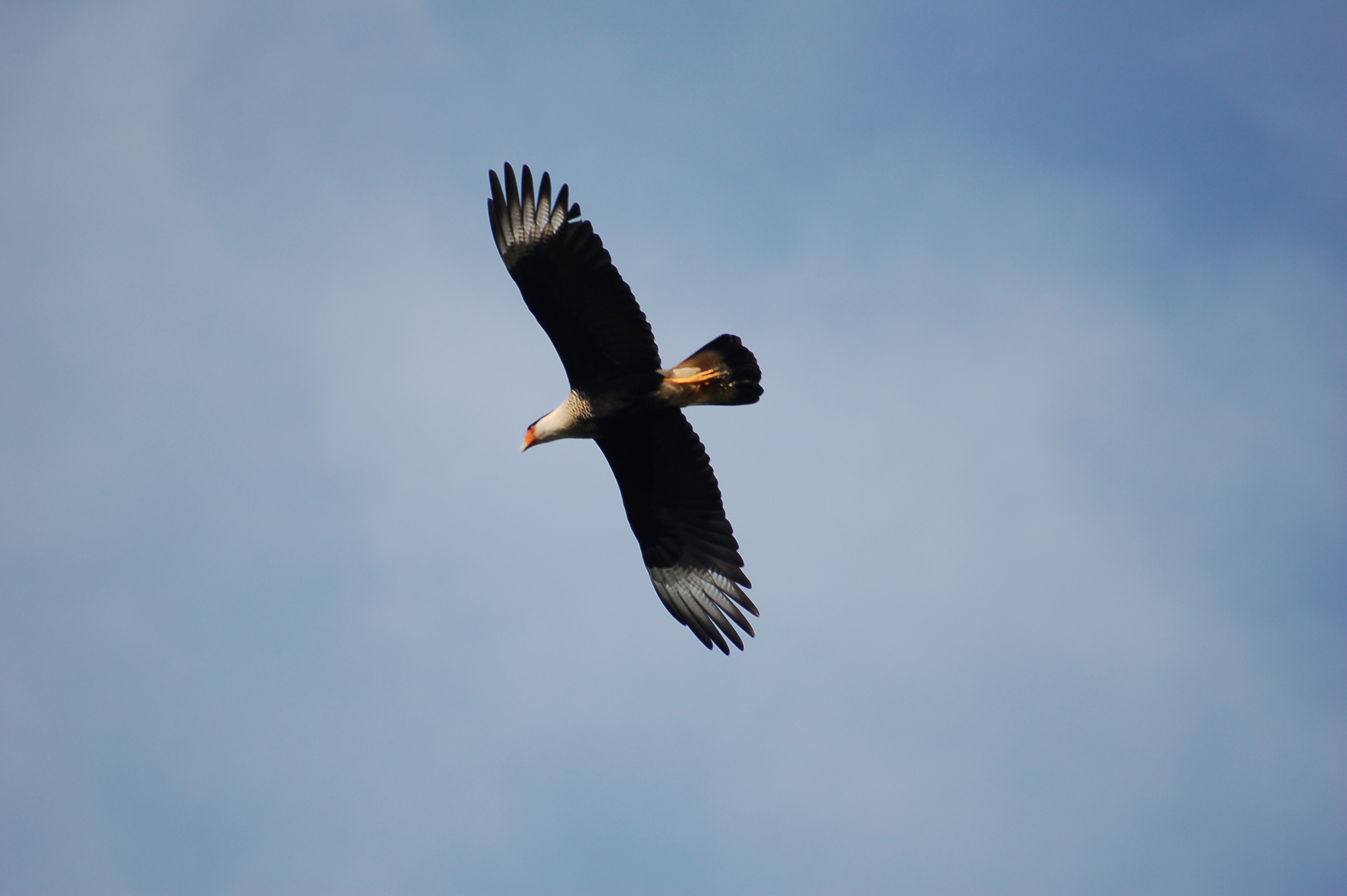 Karibikarakara, Palo Verde, Costa Rica